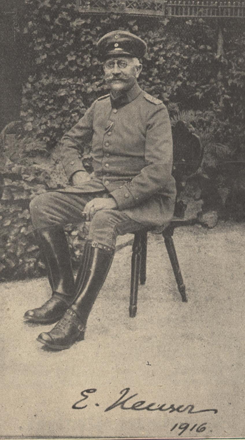 Emil Heuser, Heimatforscher, Heimatautor, Pfalz